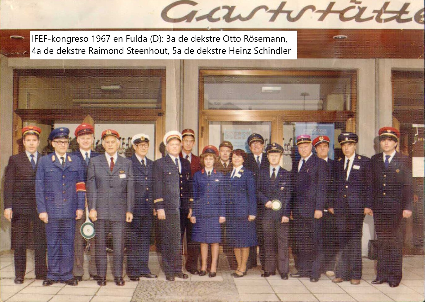 Grupa foto de la 1967a IFEF-kongreso en Fulda (D). De dekstre 3a: Otto Röseman; 4a Raimond Steenhout; 5a Heinz Schindler.